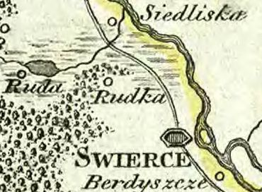 Rudka (powiat chełmski) na mapie Galicji Zachodniej, 1803 r.